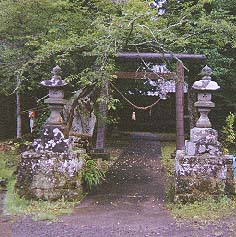 筒森神社